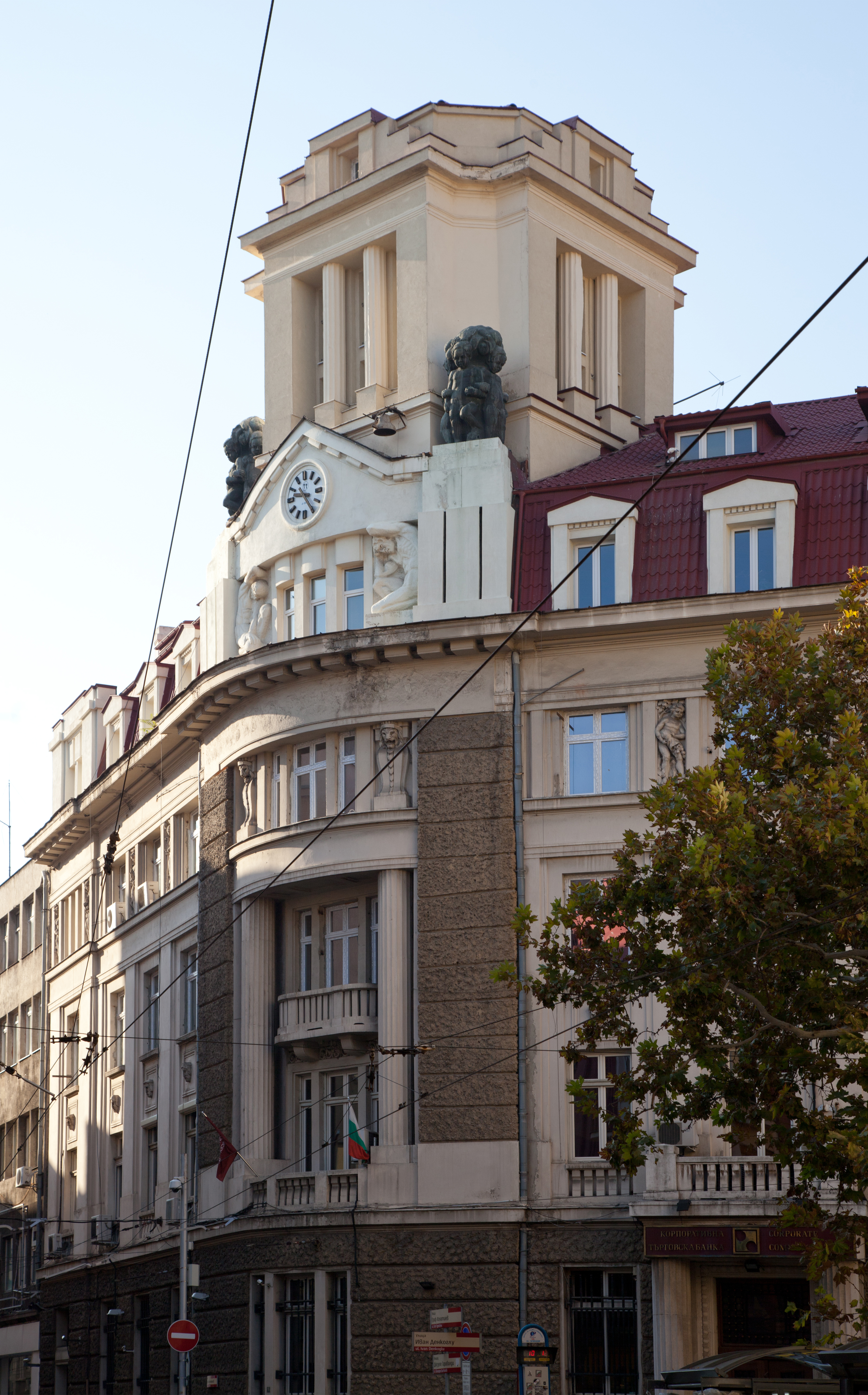 Улица "Граф Николай Игнатиев" минава през площад Джузепе Гарибалди" покрай "Корпоративна търговска банка" в София